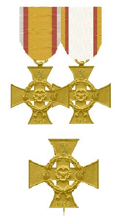 Drie kruisen en de twee linten